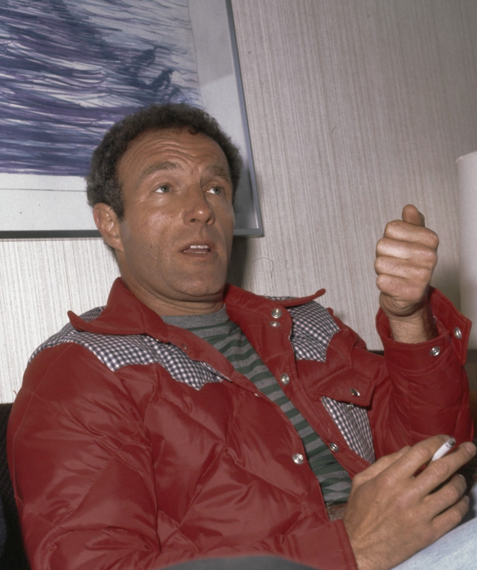 De filmacteur James Caan in Nederland voor opnamen van de film "Een Brug te ver' ("A Bridge too Far")